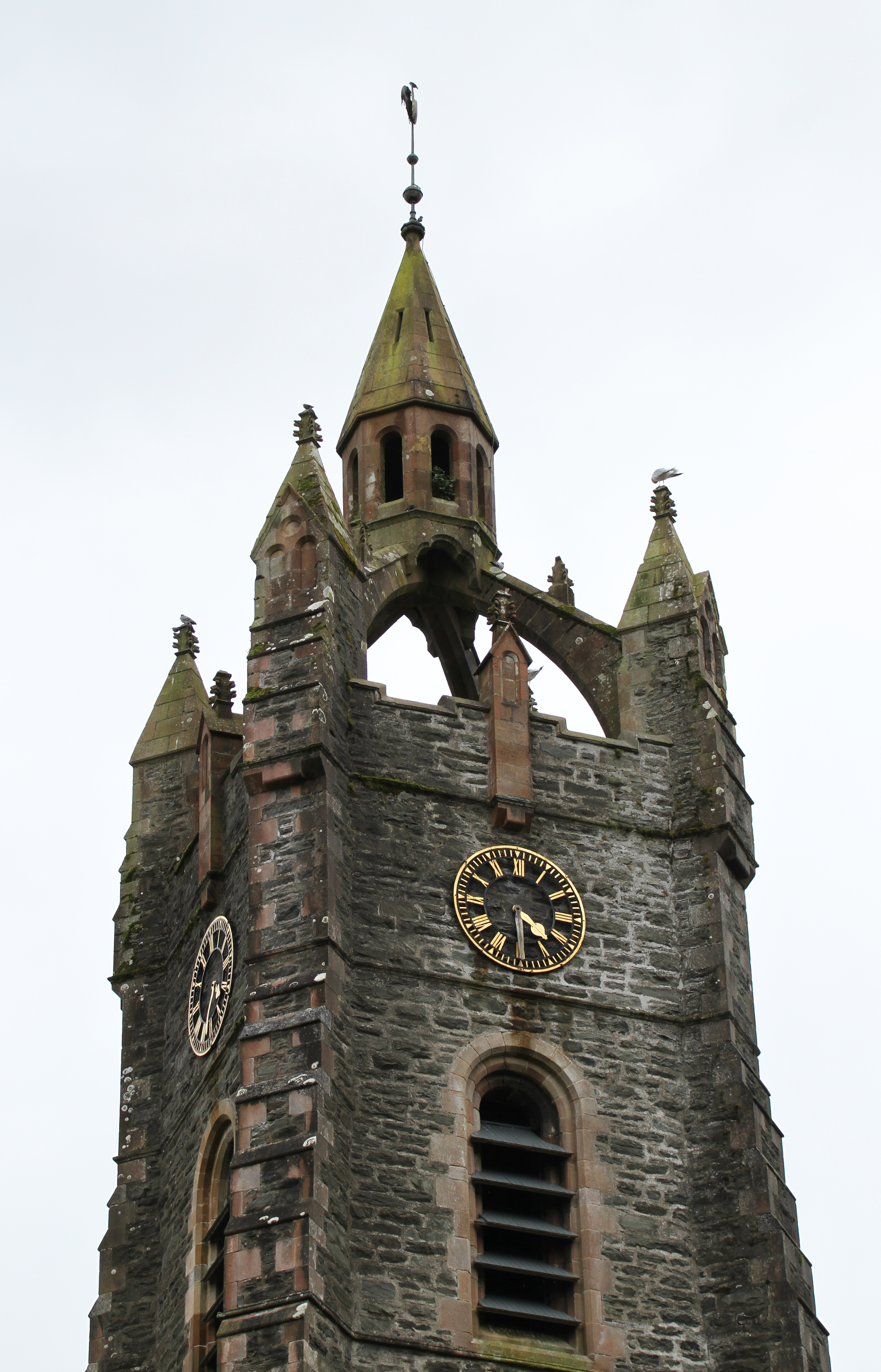 Tarbert 8